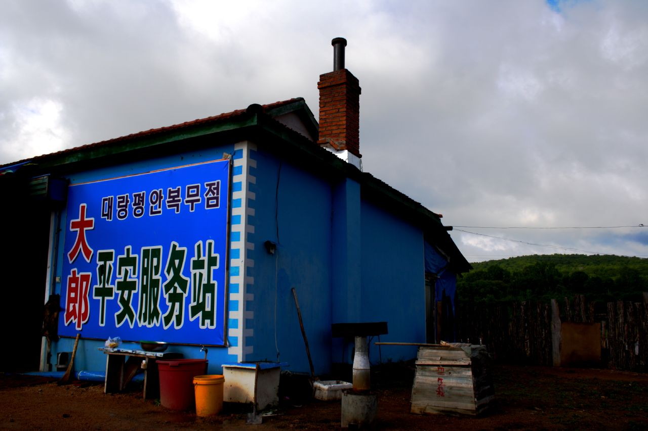 Paesaggio bilingue Dongbei 东北, China, June, 2009